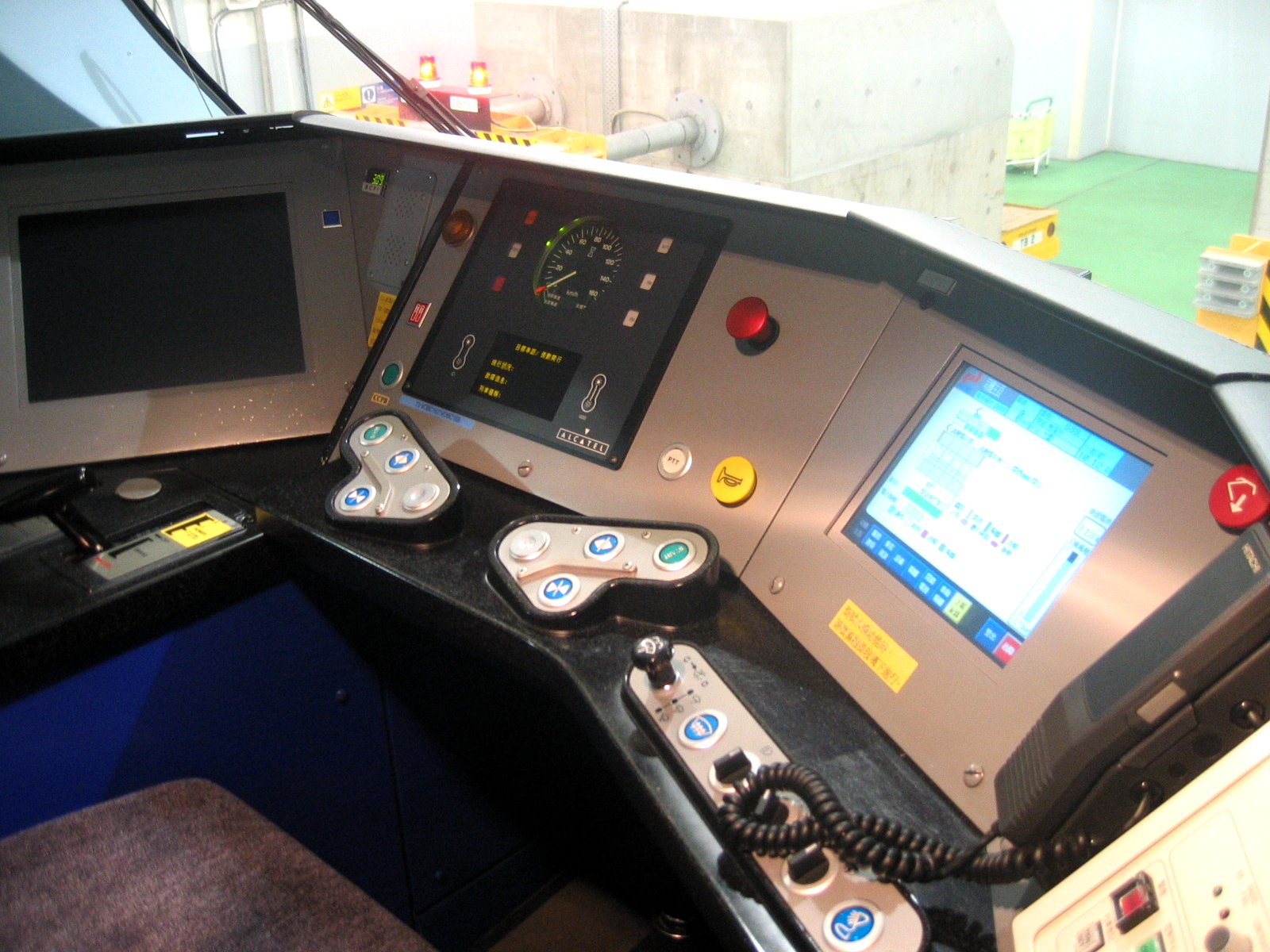 KCR SP1900 panel